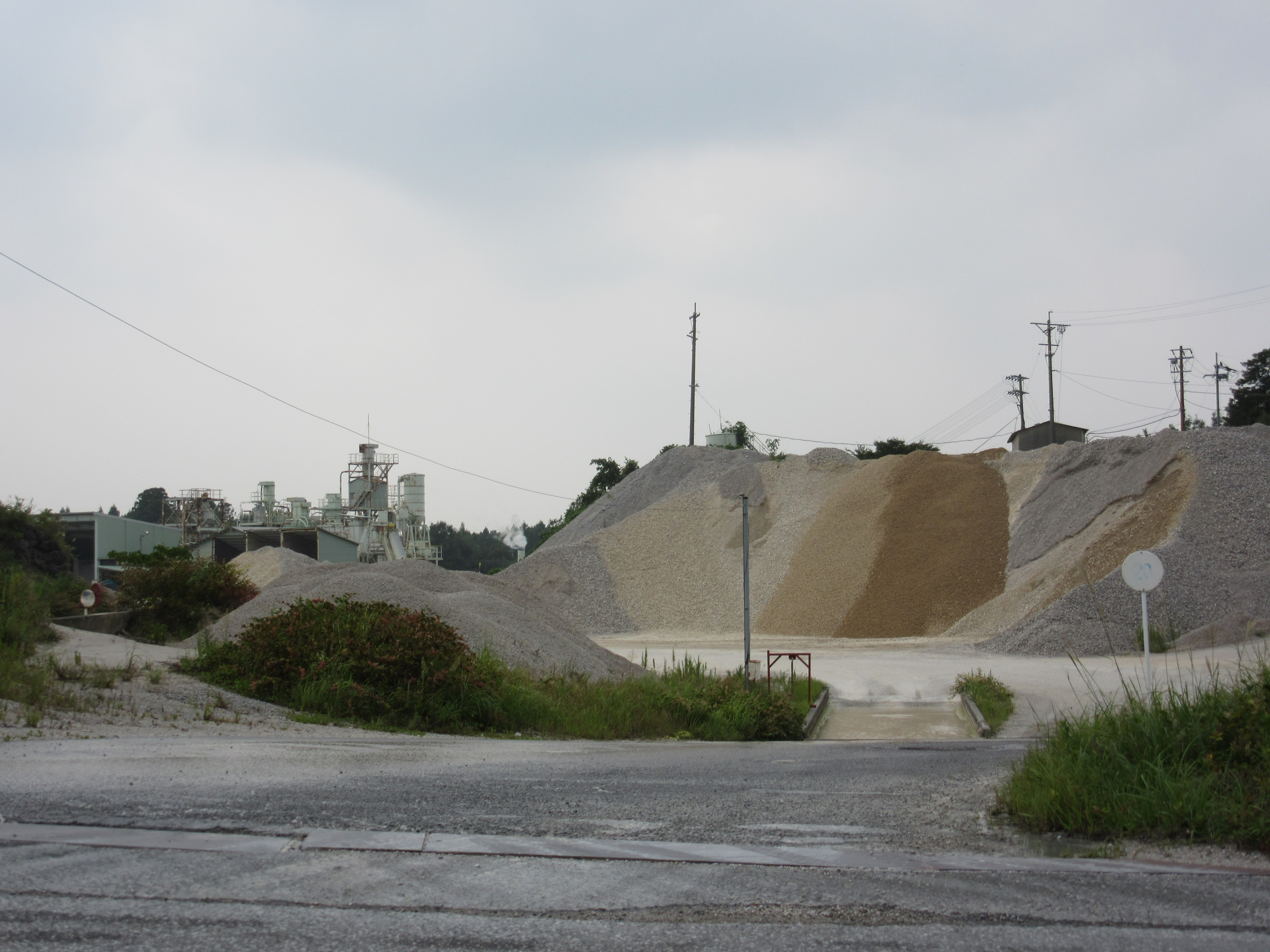 近江鉱業小田工場